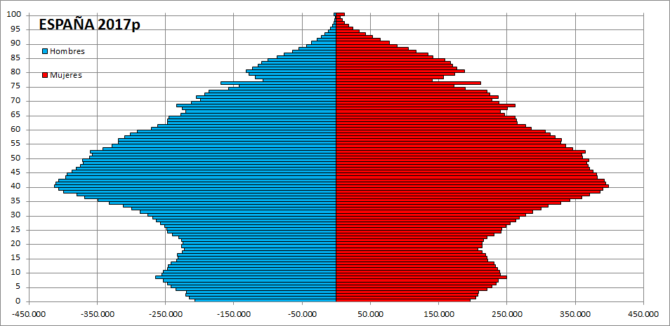 Población por edad (año a año) de España. Estadística del Padrón Continuo. Instituto Nacional de Estadística.